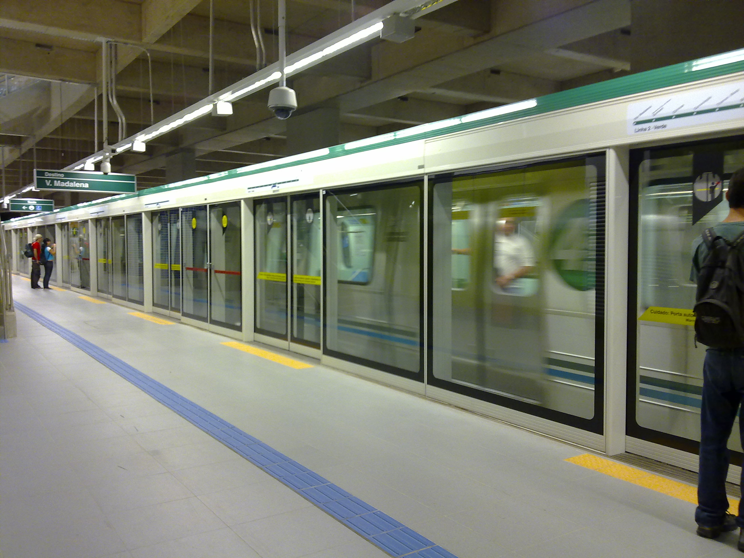 Interior da estação Sacomã do Metrô de São Paulo, linha verde paulistana.